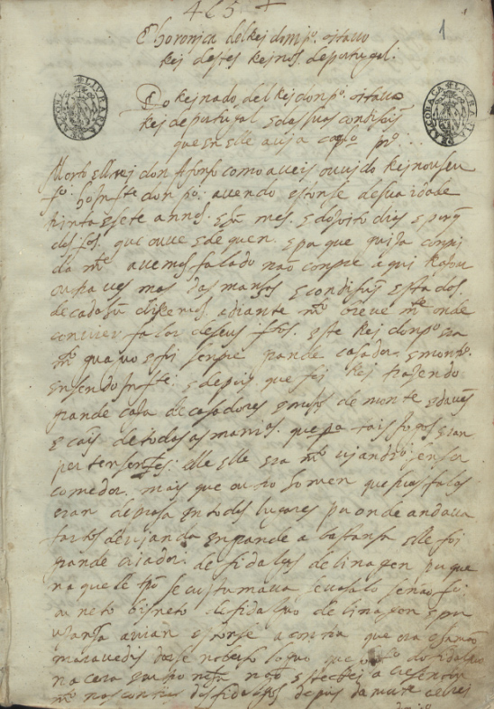 Primeira página das Crónicas de D. Pedro I e D. Fernando de Fernão Lopes; Crónica de D. João I: Terceira parte / Gomes Eanes de Zurara [1575-1600].